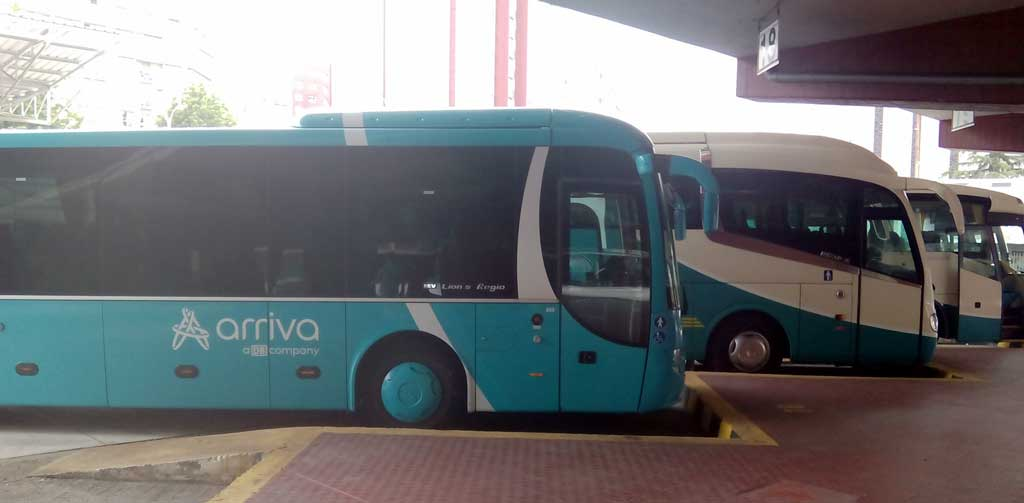 Buses de Arriva na estación da Coruña.